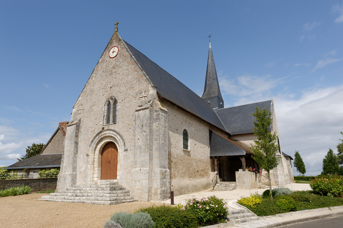 Église Notre-Dame de Françay .